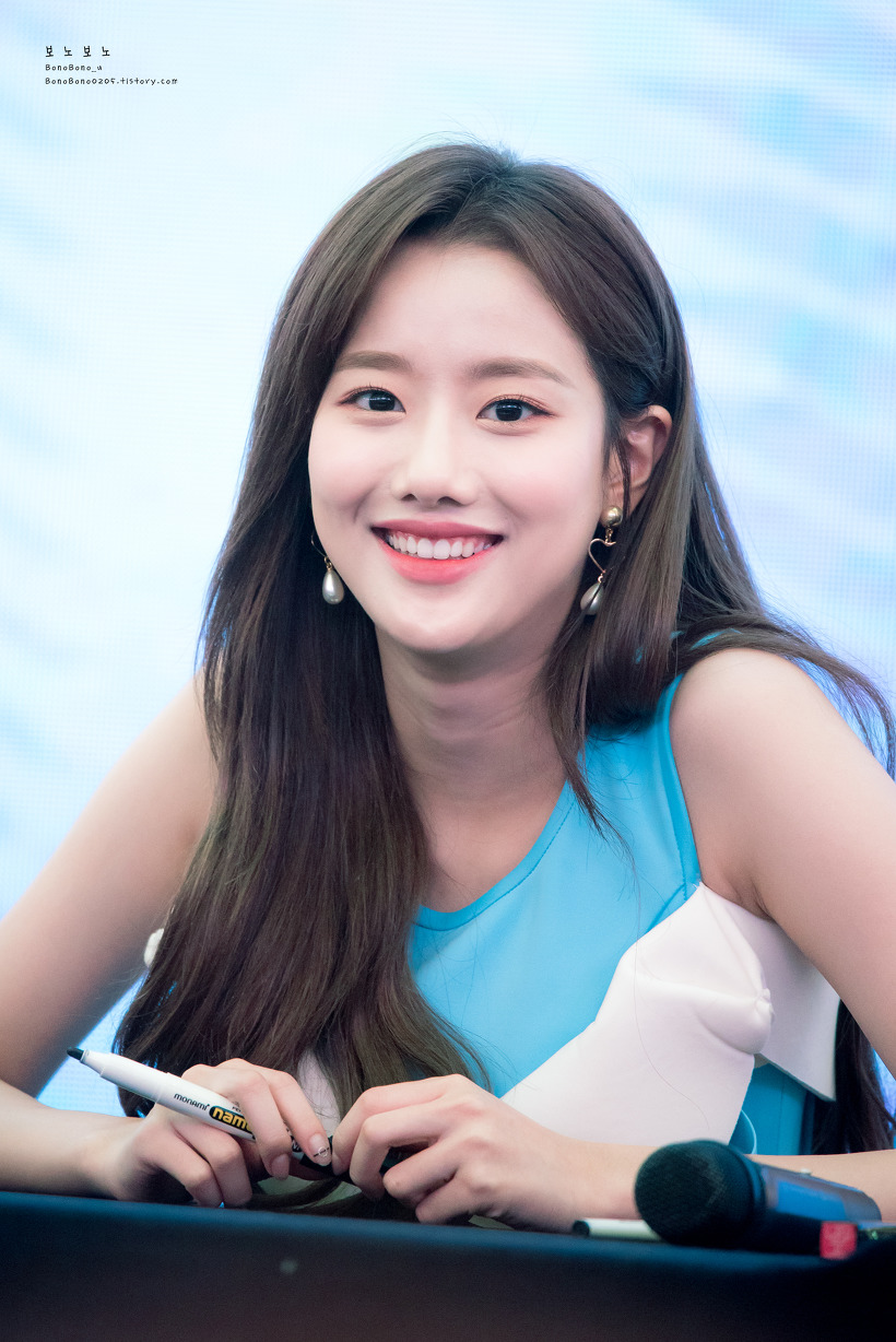 180325 에이프릴 고양 스타필드 팬사인회